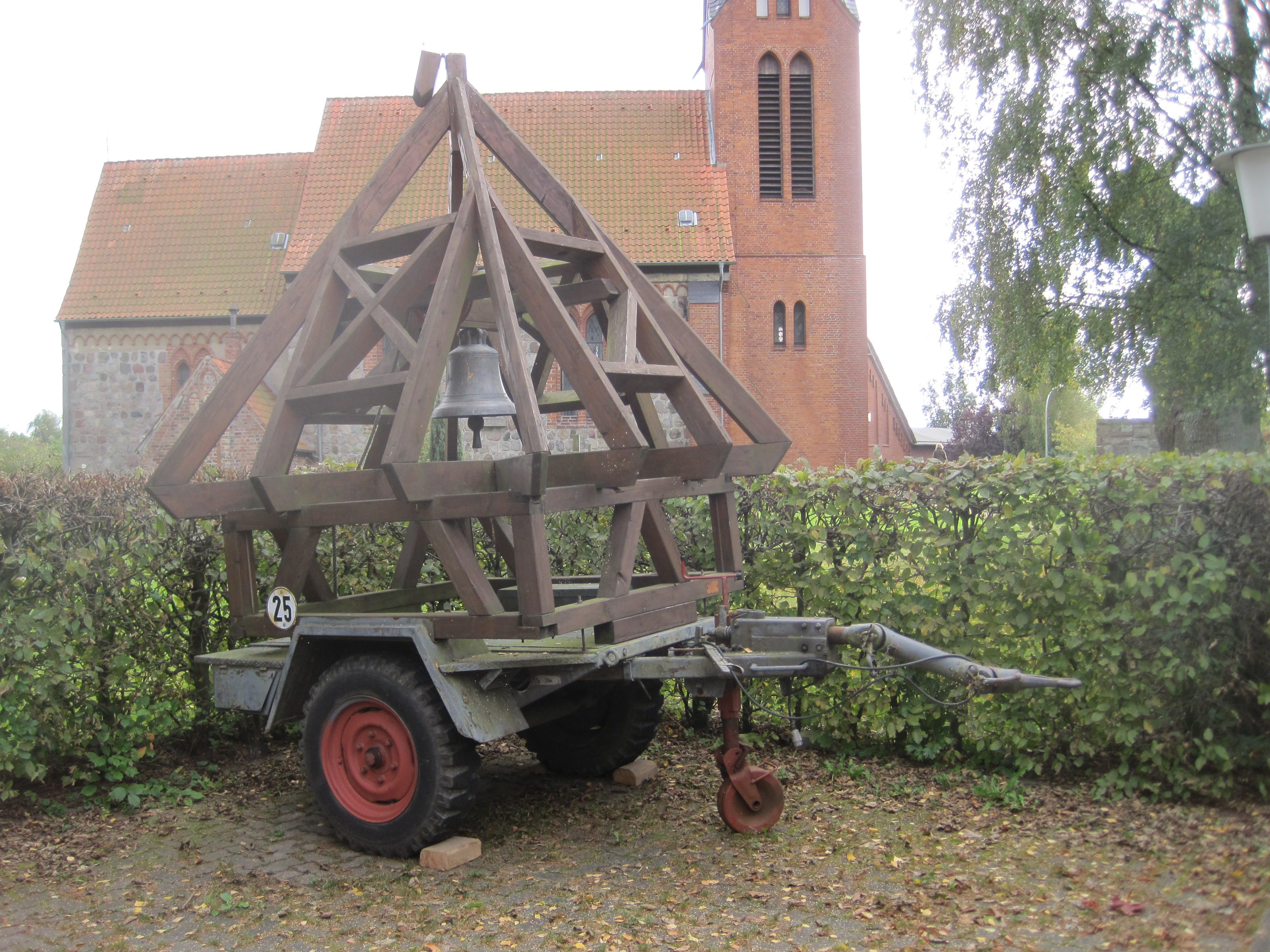 Auf Anhänger montierter Glockenstuhl vor der Kirche von Behlendorf